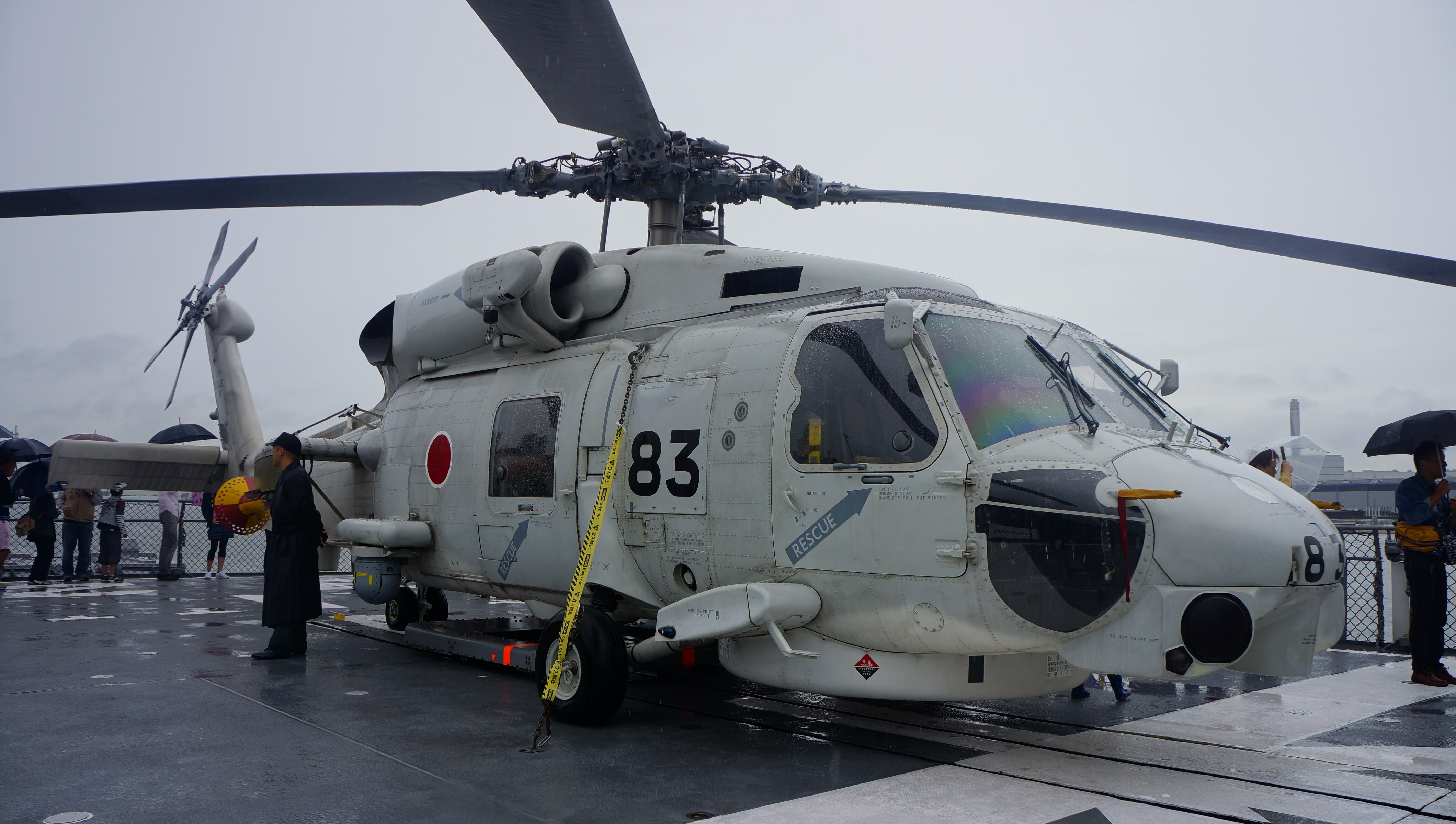 海上自衛隊 護衛艦あさゆき（DD-132）艦上のSH-60J哨戒ヘリコプター（8283号機）。 2013年10月20日 堺泉北港にて。